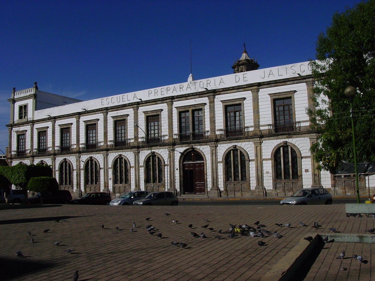 Toma Fotografica de la Fachada de la Escuela Preparatoria de Jalisco.